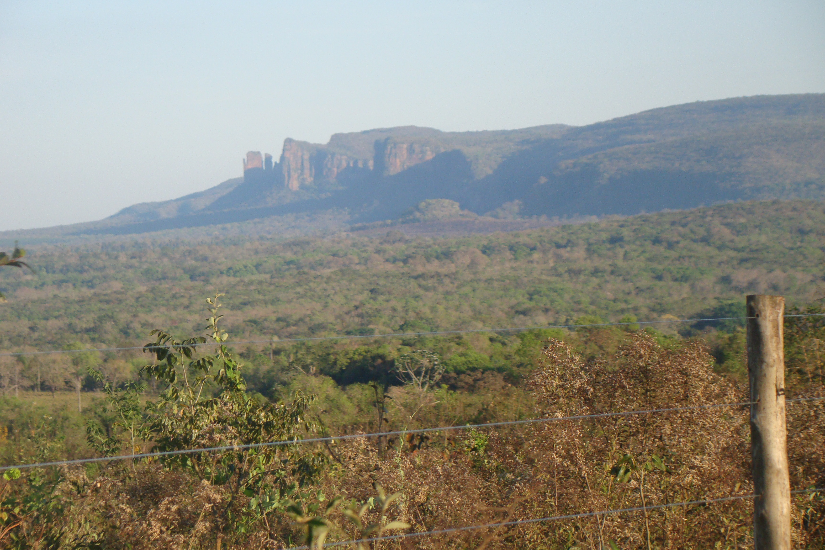 Serra de Maracaju - Vale do Aquidauana MS